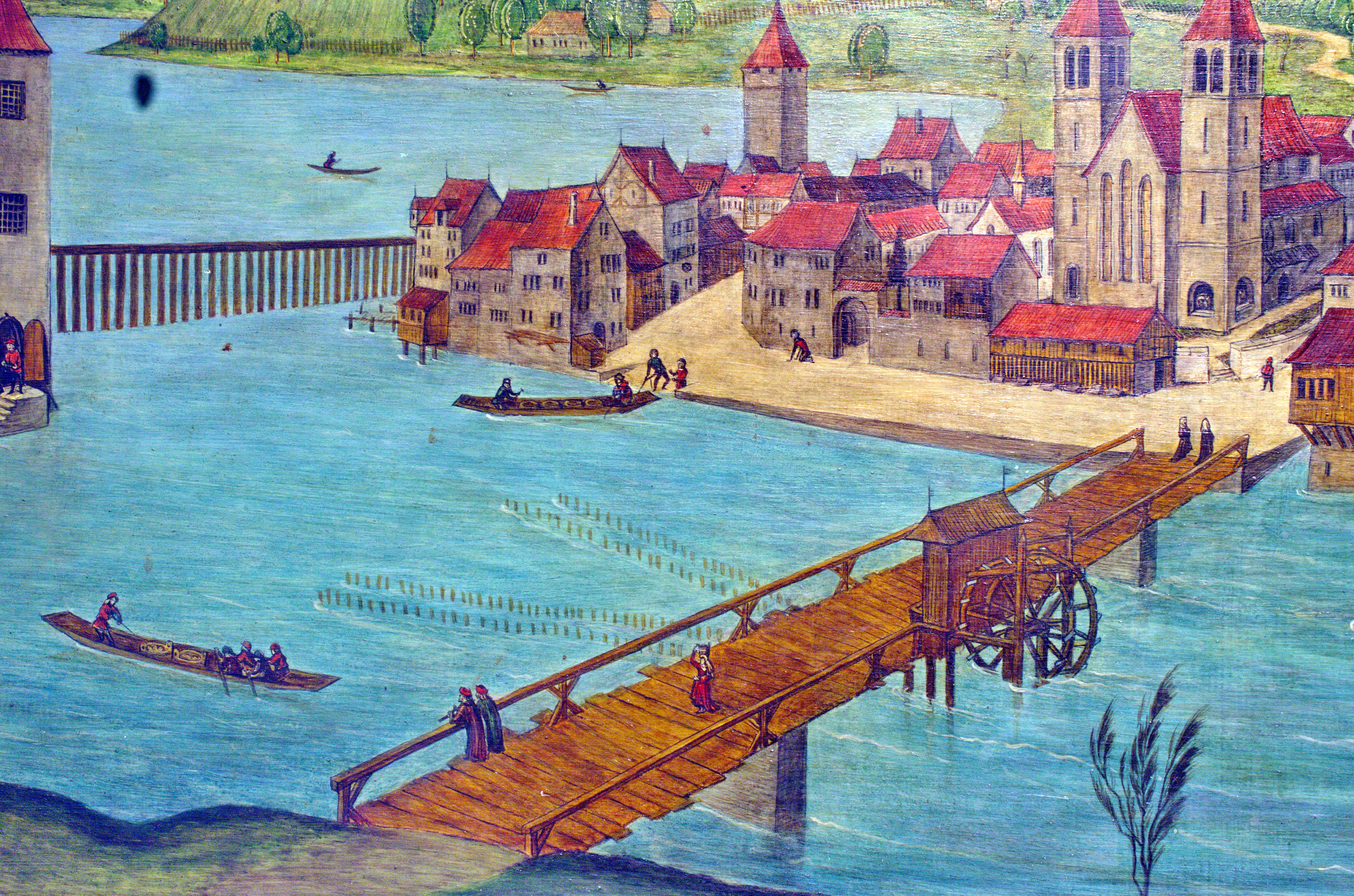 Das (von links) Kratzquartier, das Fraumünster, der Münsterhof und die Münsterbrücke auf der Replik der Altartafeln von Hans Leu im Baugeschichtlichen Archiv der Stadt Zürich im Haus zum Rech. Die Panoramansicht des linksseitigen Limmatufers – 'Standort' der BetrachterIn ist wohl der Karlsturm des Grossmünsters – von Hans Leu d. Ä. gilt als die älteste zuverlässige Darstellung der Stadt Zürich, Ende des 15. Jahrhunderts auf den Altartafeln im Grossmünster mit viel Liebe zum Detail festgehalten. Die originalen Tafeln sind heute im Landesmuseum ausgestellt, eine (vermutlich) 1:1 Replik ist im Stadtarchiv öffentlich zugänglich.